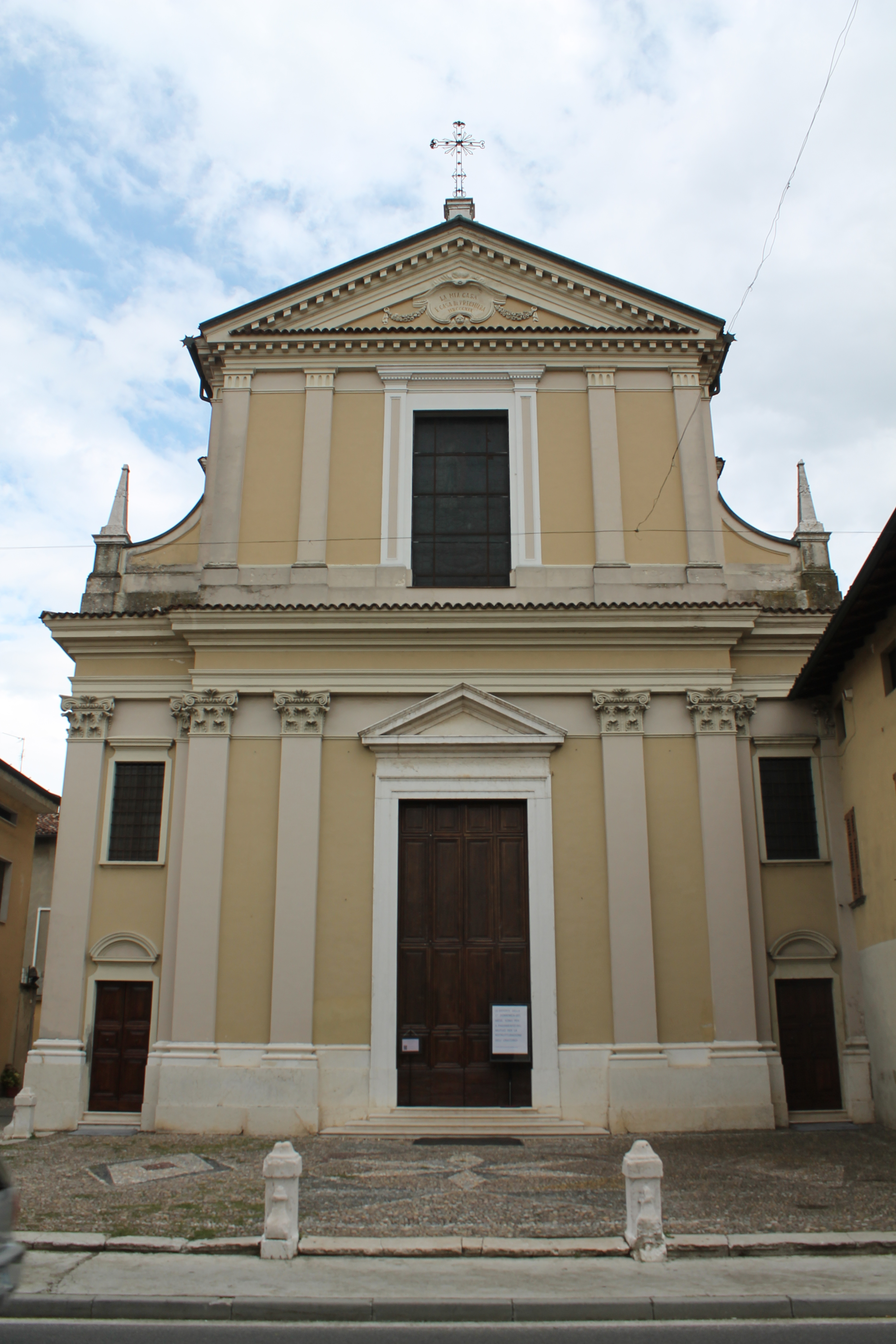 Foto della Chiesa di S.Antonio Abate, Castelcovati, BS.